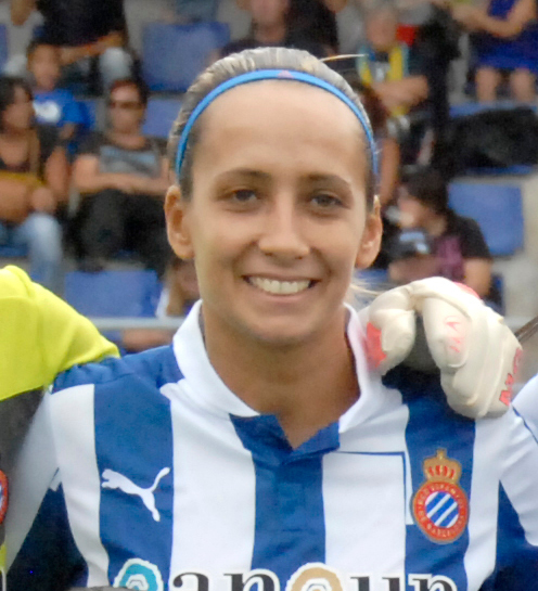 Equip femení del RCD Espanyol.Back row (L-R): María José Pons, Sónia Matias, Débora García, Marta Torrejón, Sandra Vilanova, Vanesa Gimbert; Front row (L-R): María Paz Vilas, Brenda Pérez Soler, Silvia Meseguer, Nuria Mendoza, Sara Monforte